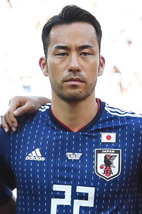 Япония проиграла Польше, но вышла в плей-офф